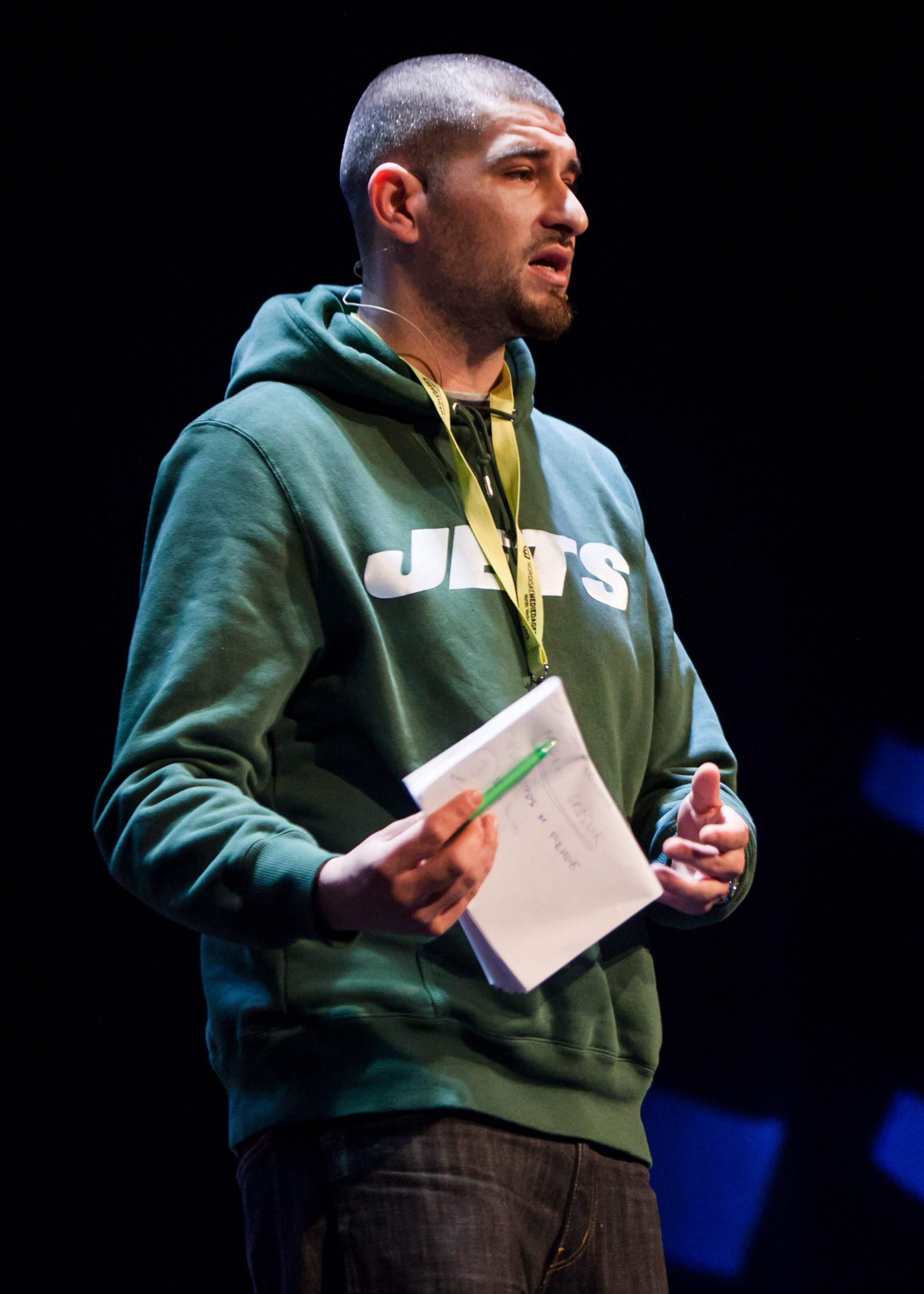 Leo Ajkic